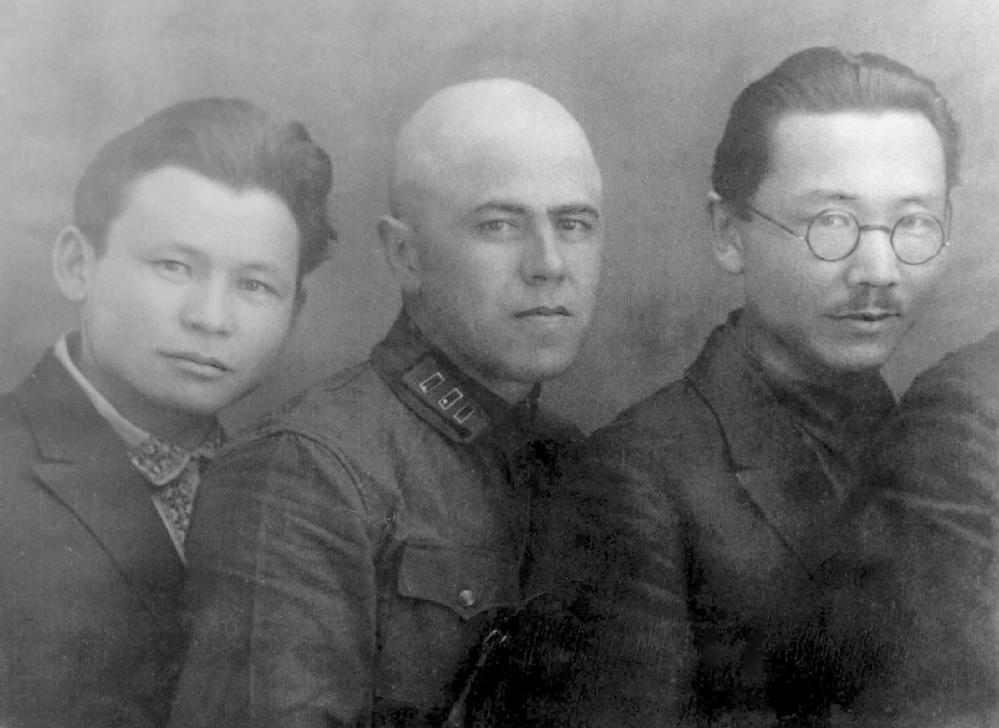 М.К.Аммосов, И.П.Редников, И.Н.Барахов. Москва. Фото 02.05.1930